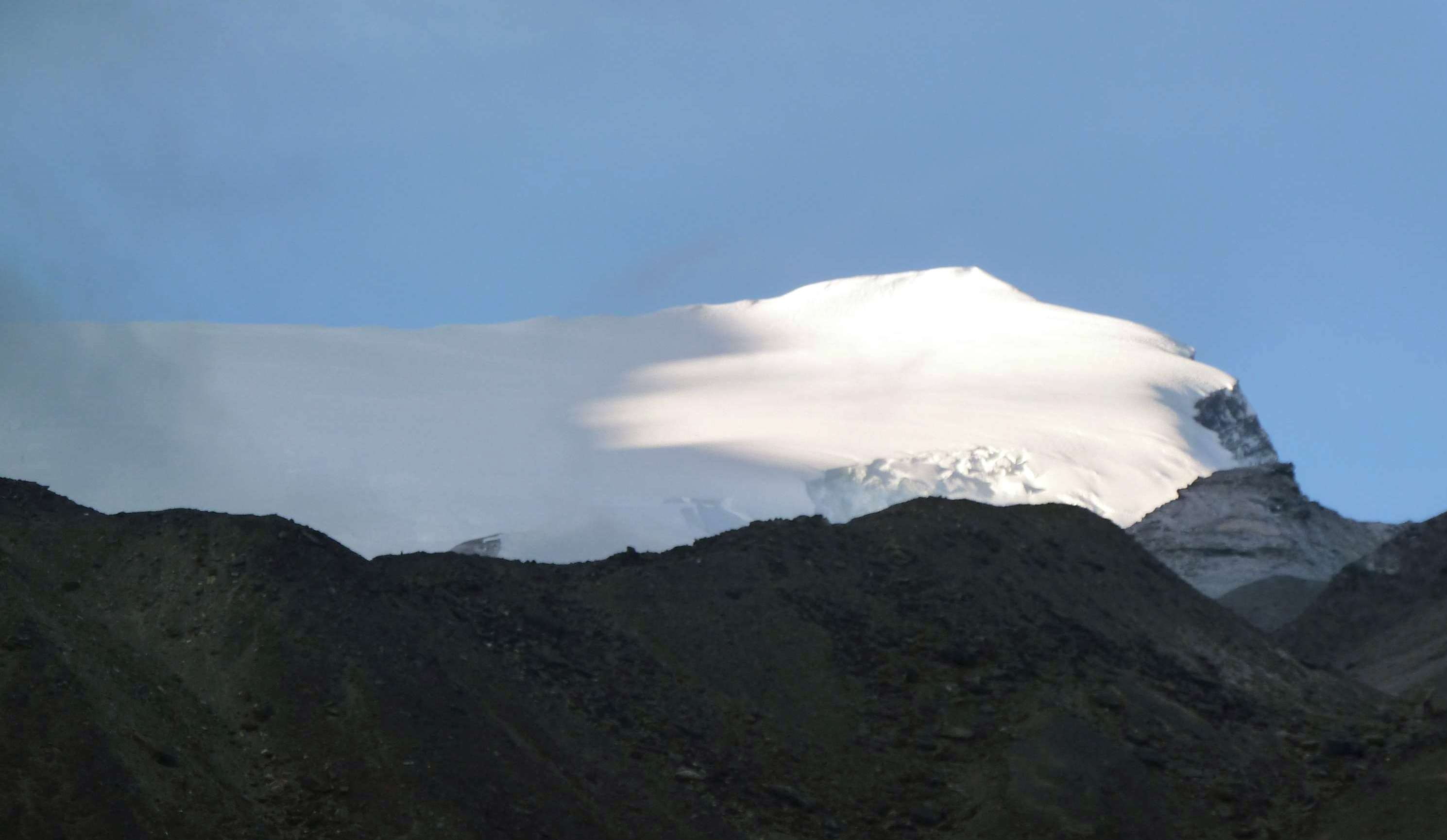 Vrchol hory Putha Hiunchuli v Nepálu - vyfoceno z BC